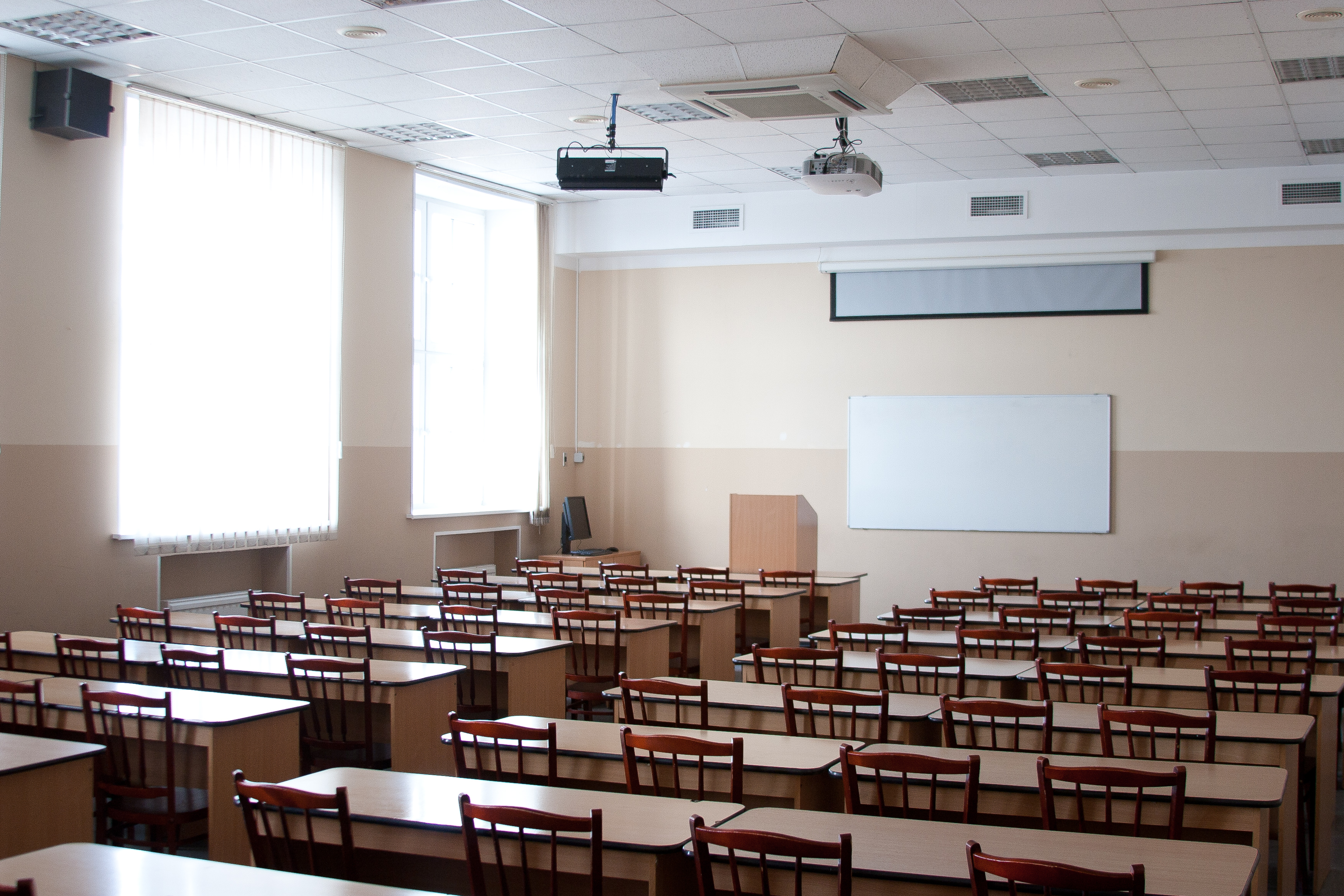 Зал №5